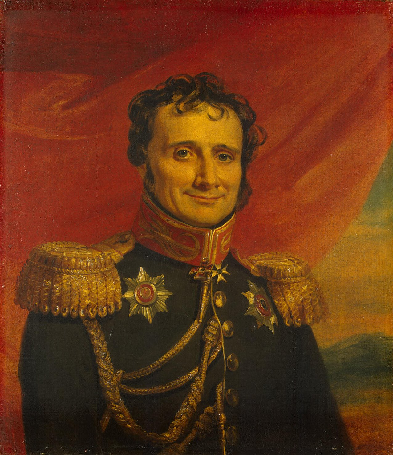 Antoine-Henri Jomini (1779–1869) russian general